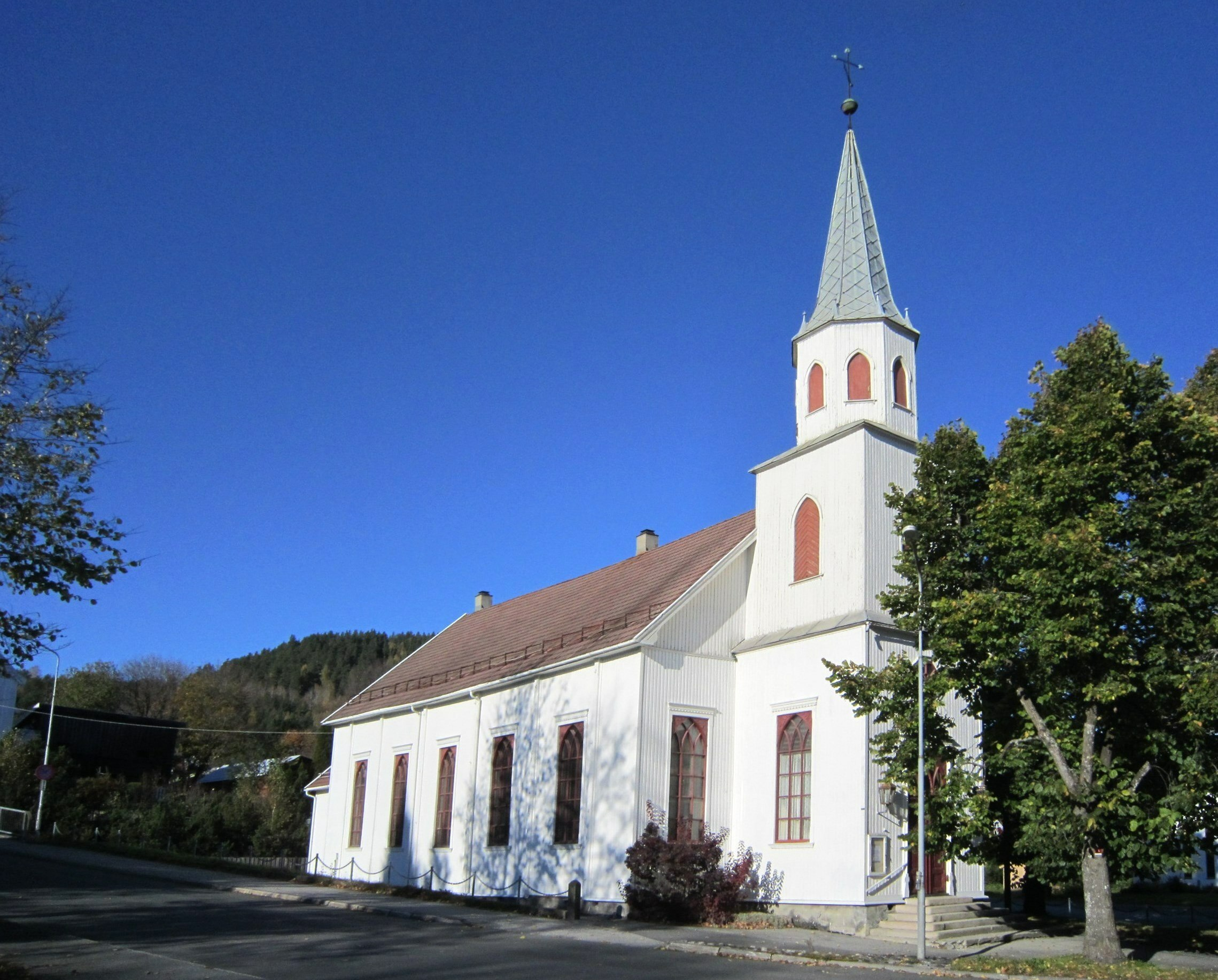 Fylkesvei 89 ved Kongsberg metodistkirke